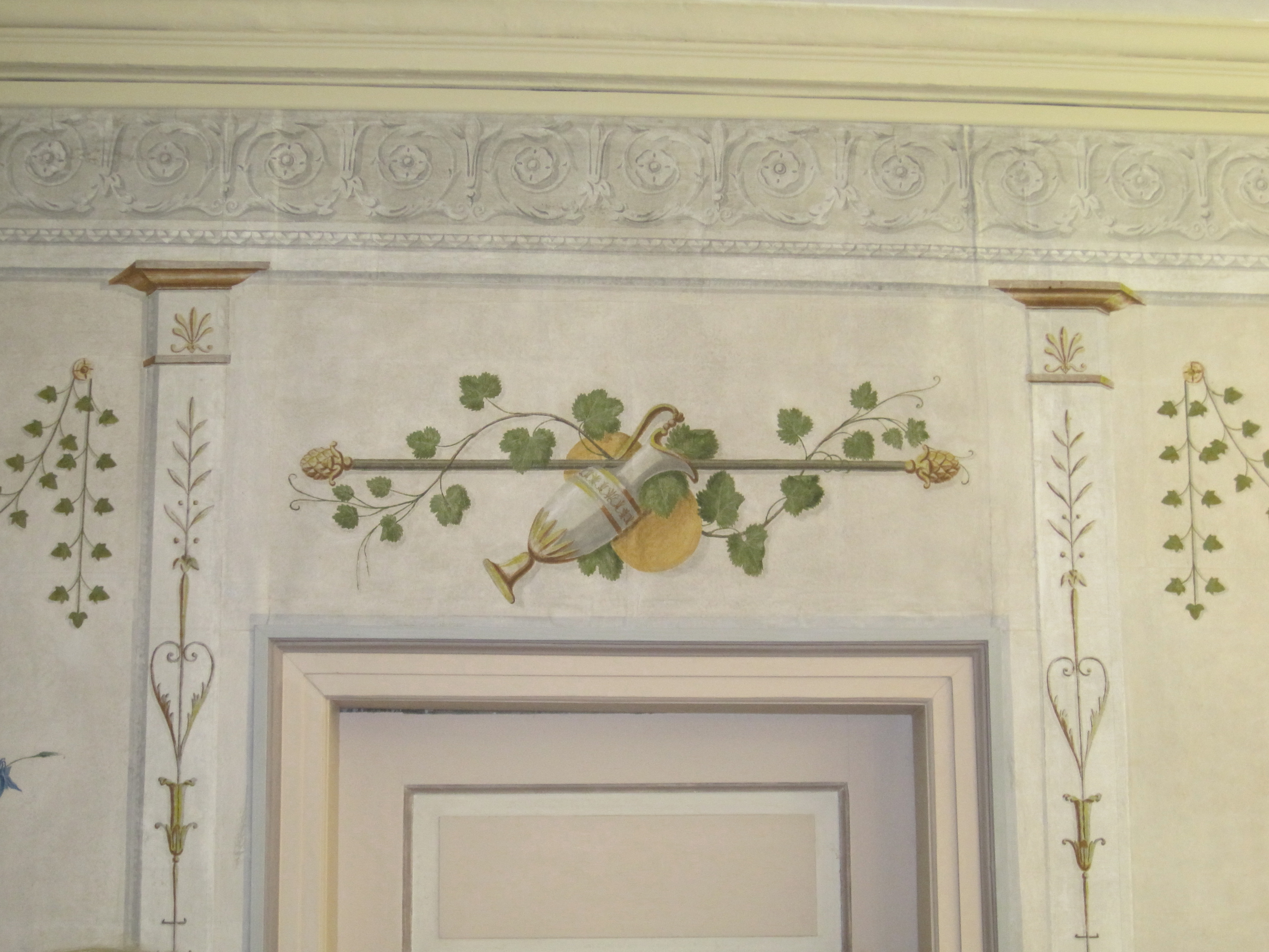 Handgemalte Tapeten, entstanden im 1. Viertel des 19. Jahrhunderts. Bachelin-Haus, Geisenheim im Rheingau